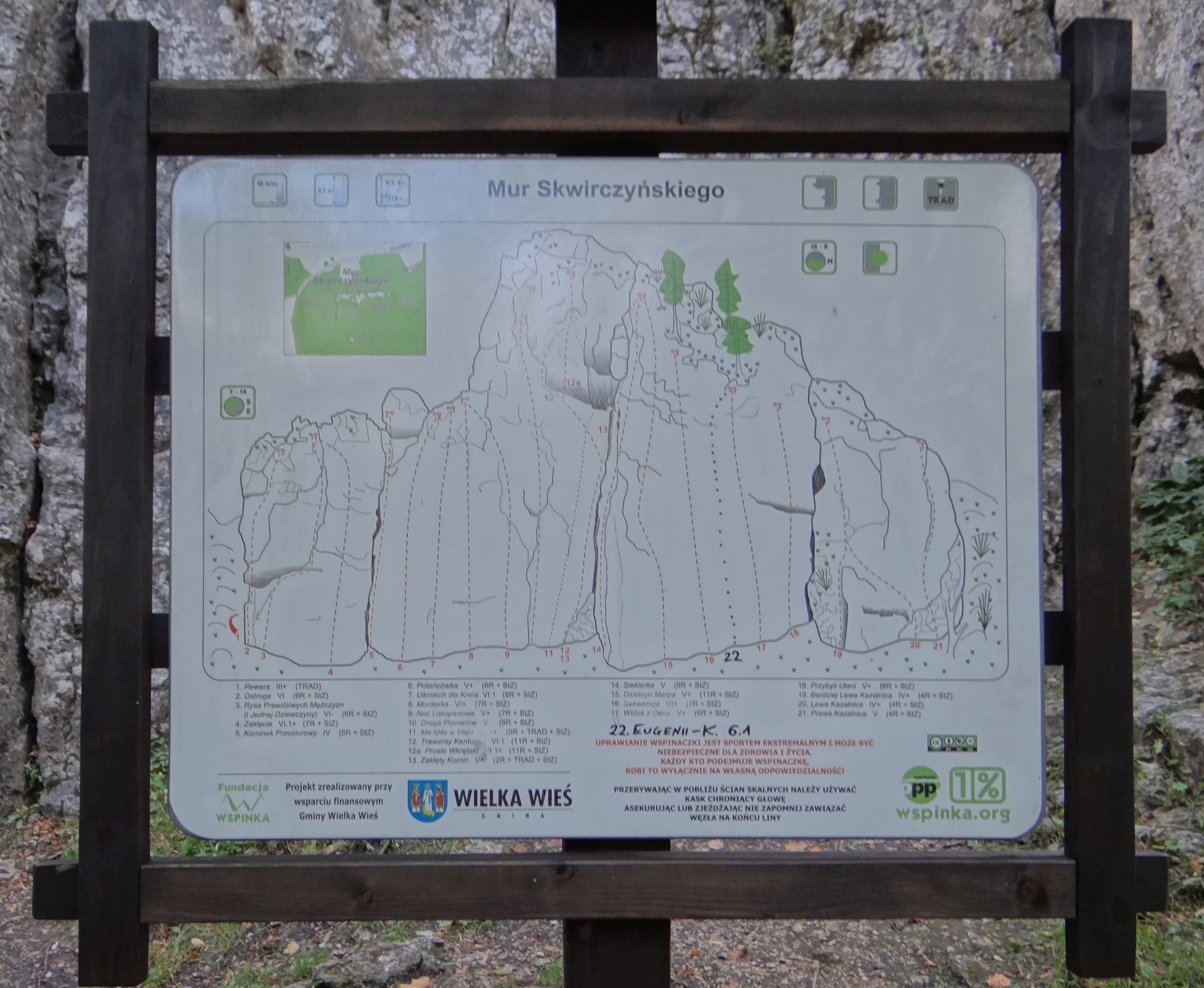 Zaklęty Mur (Mur Skirczyńskiego) w Dolinie Będkowskiej